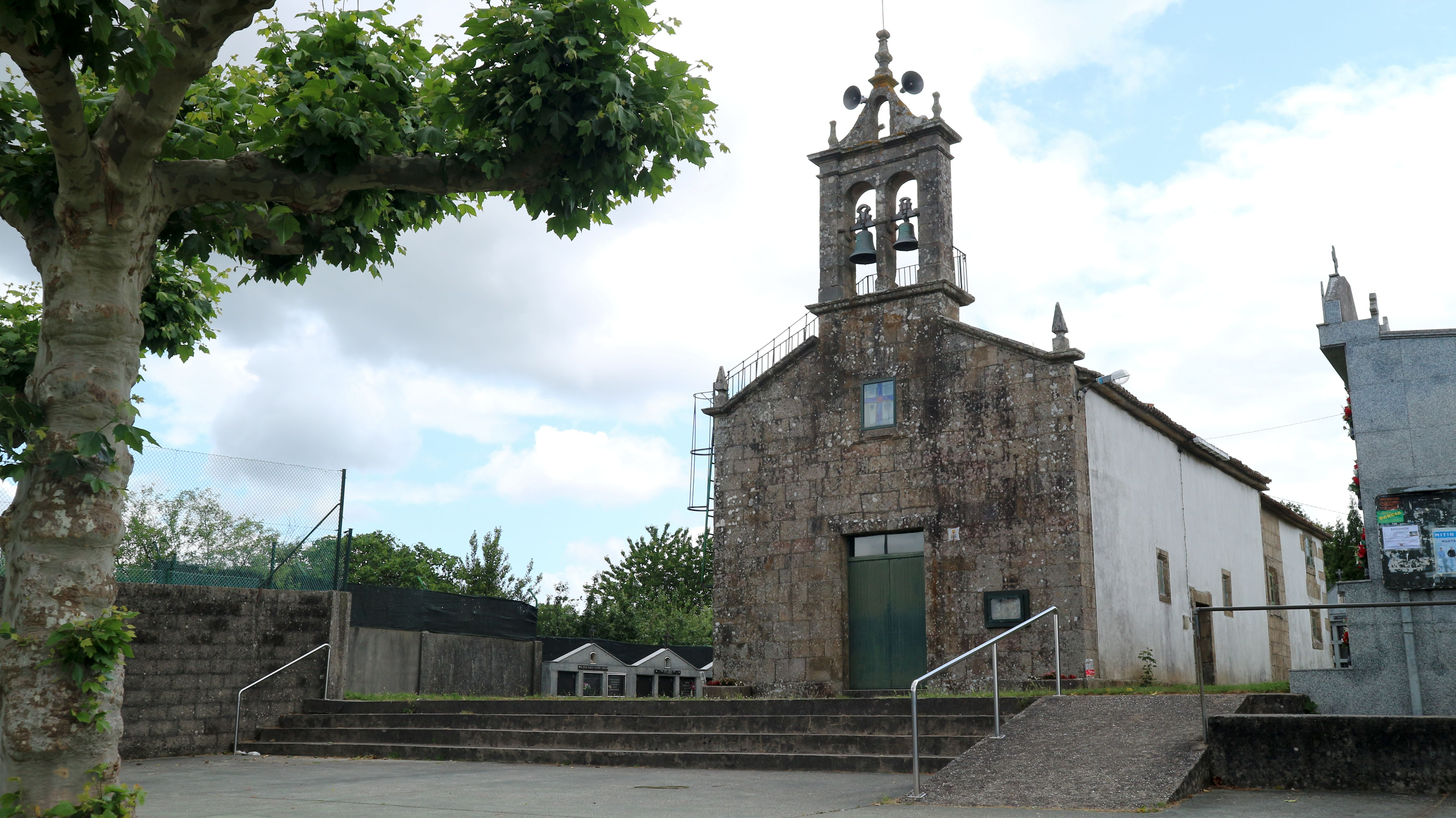 Igrexa de Santa Cruz de Montaos. Montaos, Ordes.